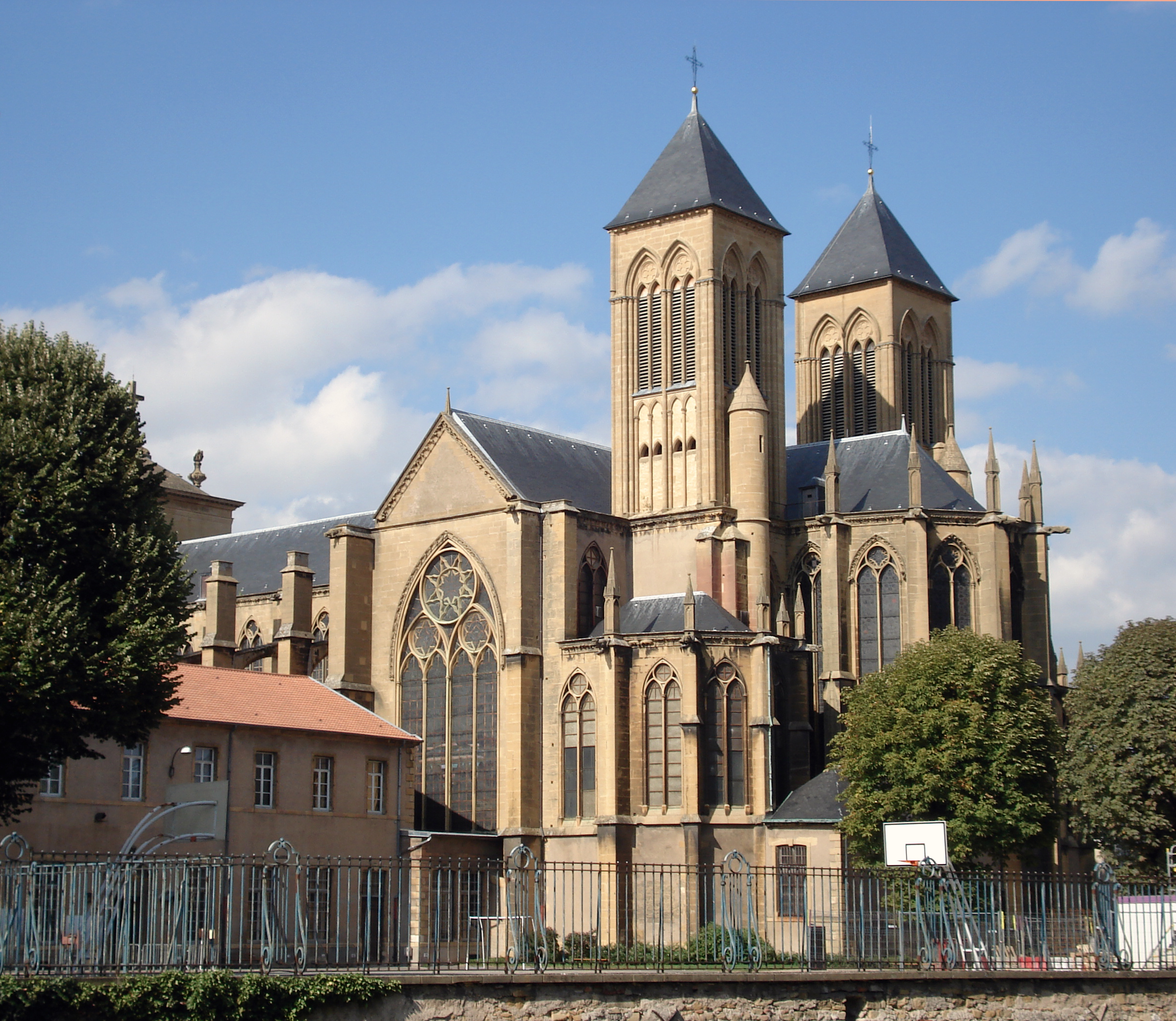 Abside harmonique de la basilique saint Vincent de Metz